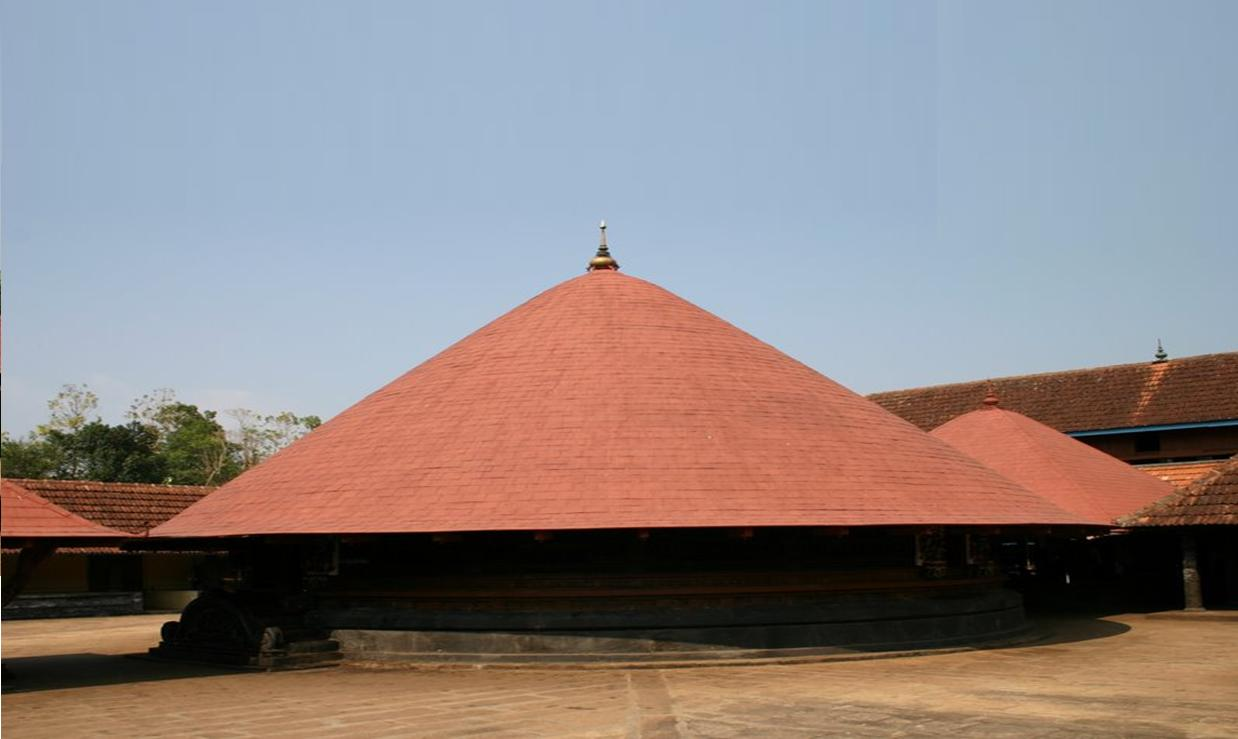 ശ്രീകോവിൽ, വാഴപ്പള്ളി